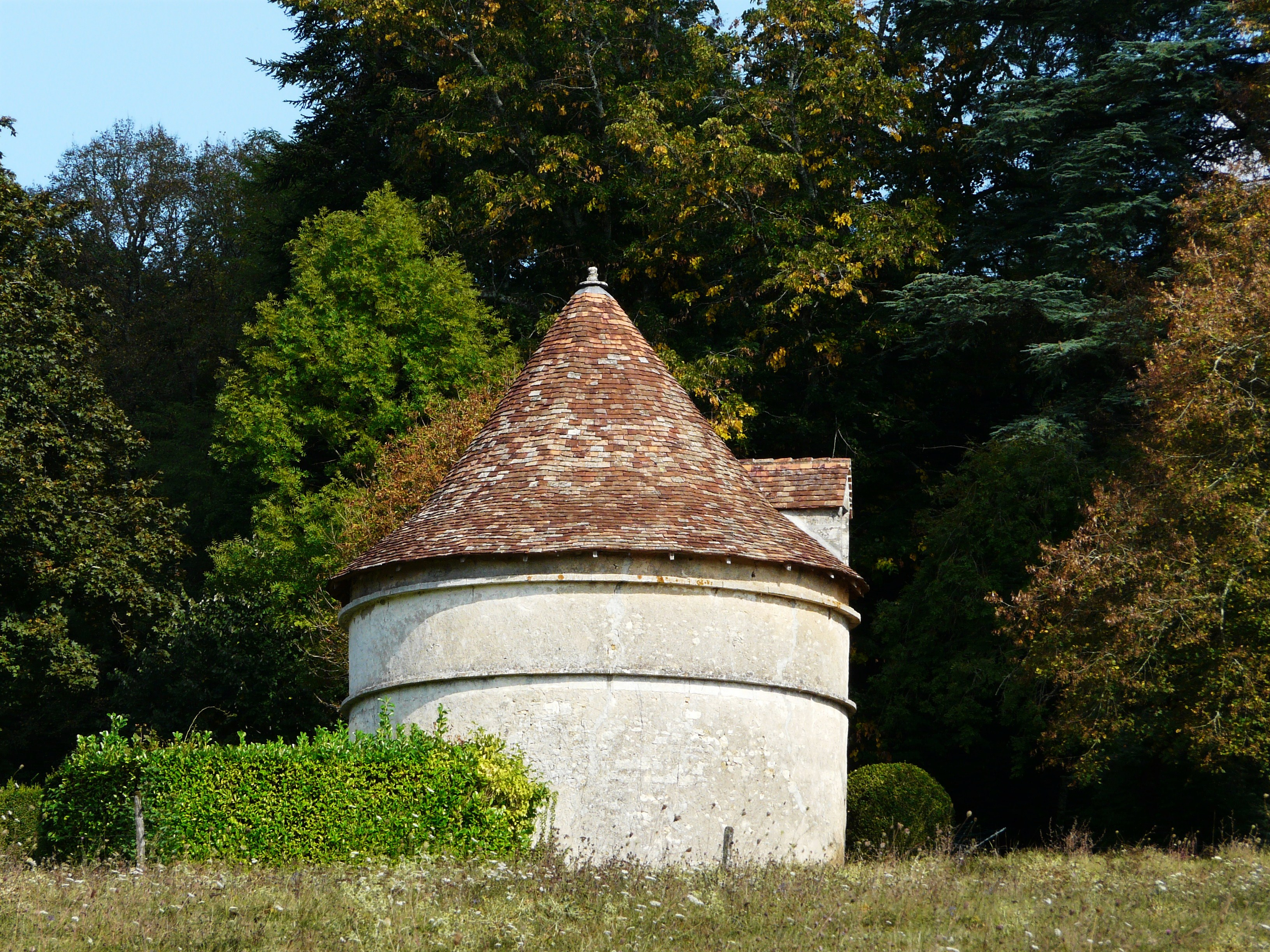 Le pigeonnier du château de la Bonnetie, Sarliac-sur-l'Isle, Dordogne, France